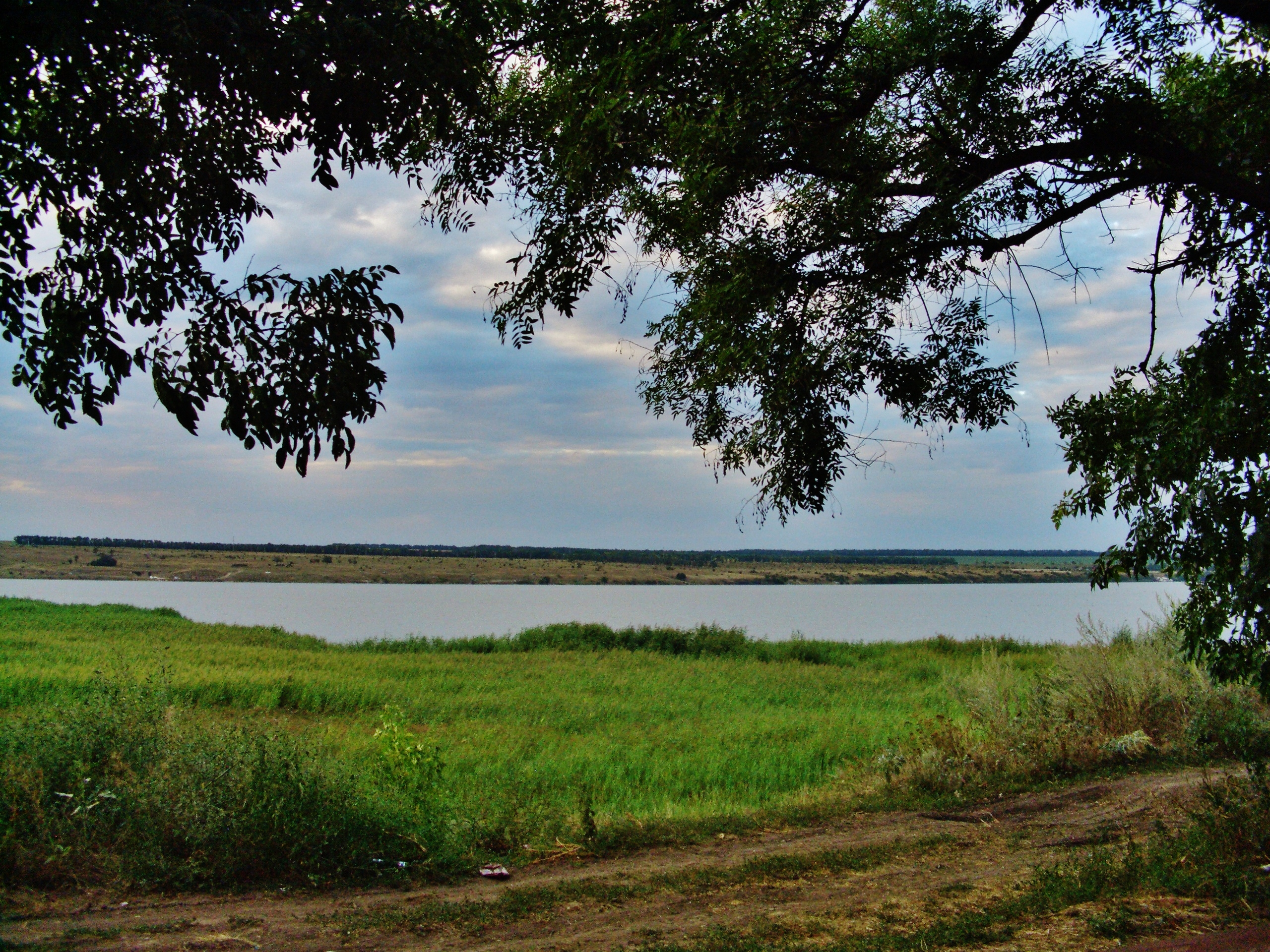 Neklinovsky District, Rostov Oblast, Russia